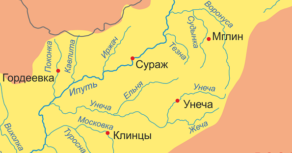 Схема бассейна реки Ипуть